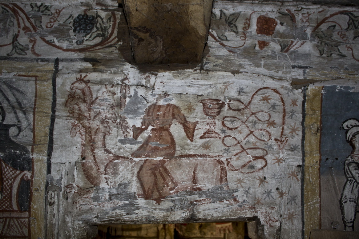 Szűz Mária-fatemplom, 17. vagy 18. század (Létka)